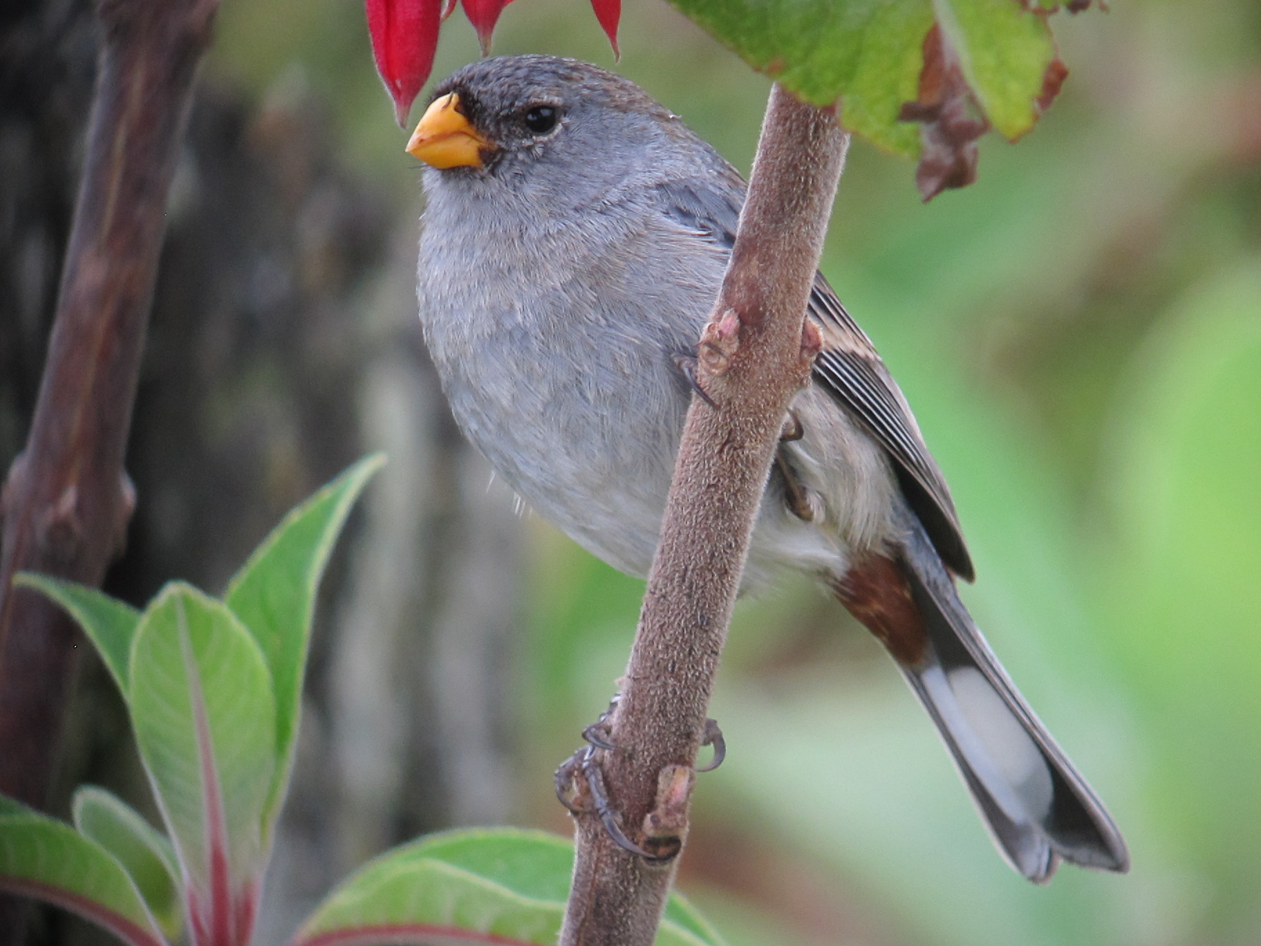 Guasca, Cundinamarca, Colombia